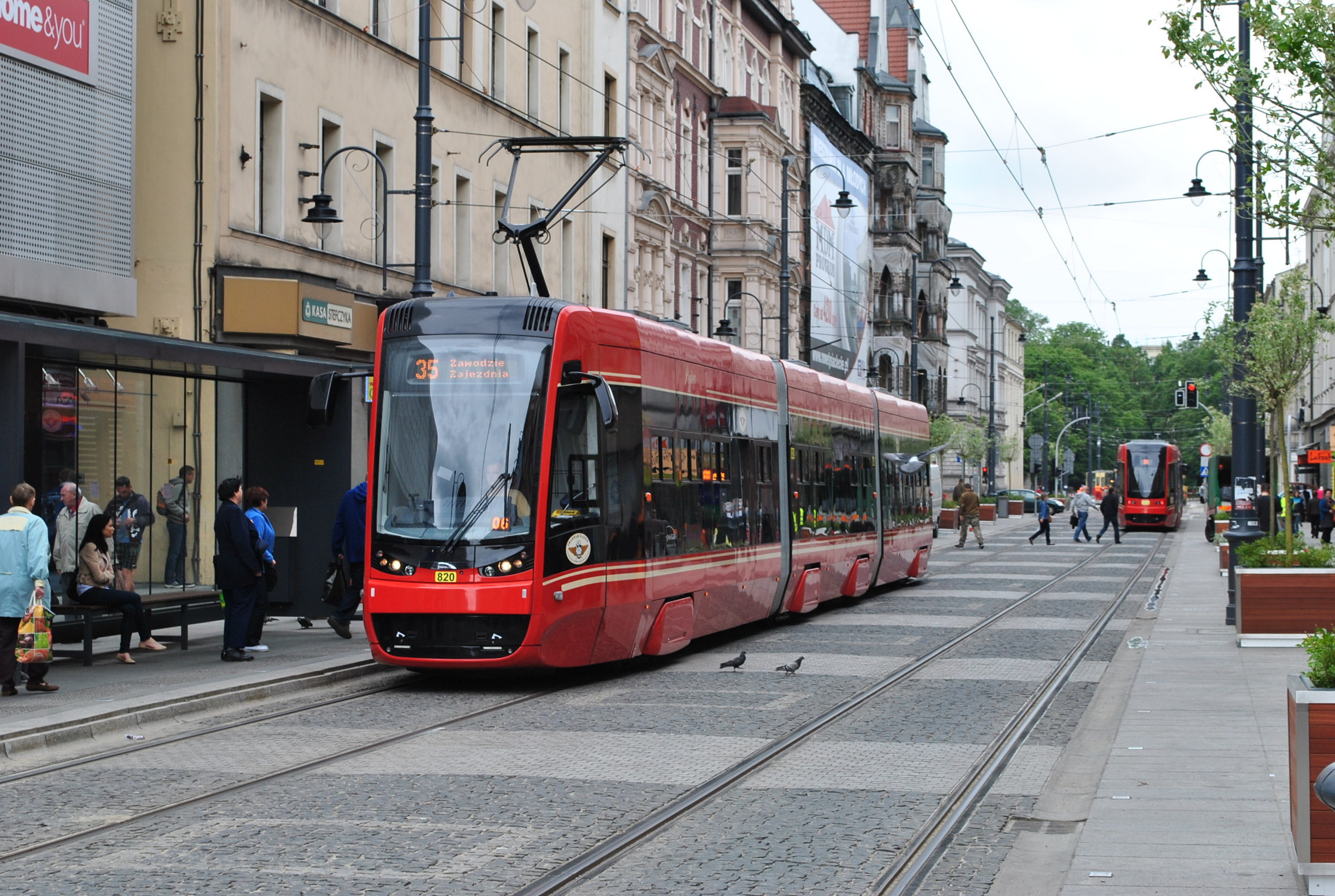 PESA Twist Step 2012N na ul. 3 Maja w Katowicach